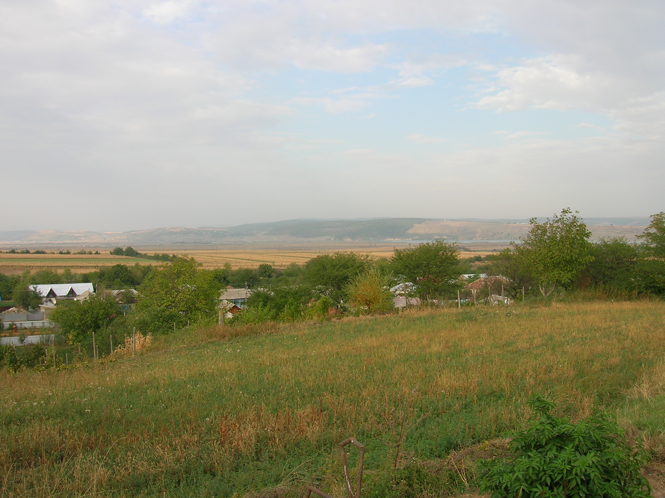 Comuna Valea Seacă Bacău - Satul Mândrişca - De pe dealul Bisericii Sfântul Ierarh Nicolae spre Colinele Tutovei